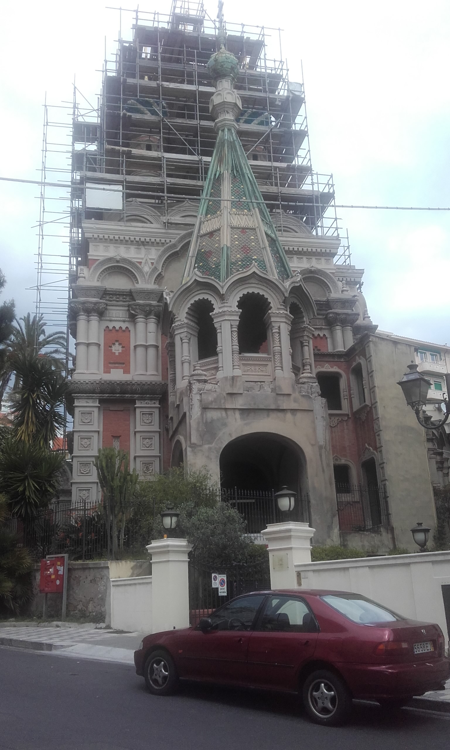 Italie, Sanremo. Église russe orthodoxe en cours de travaux